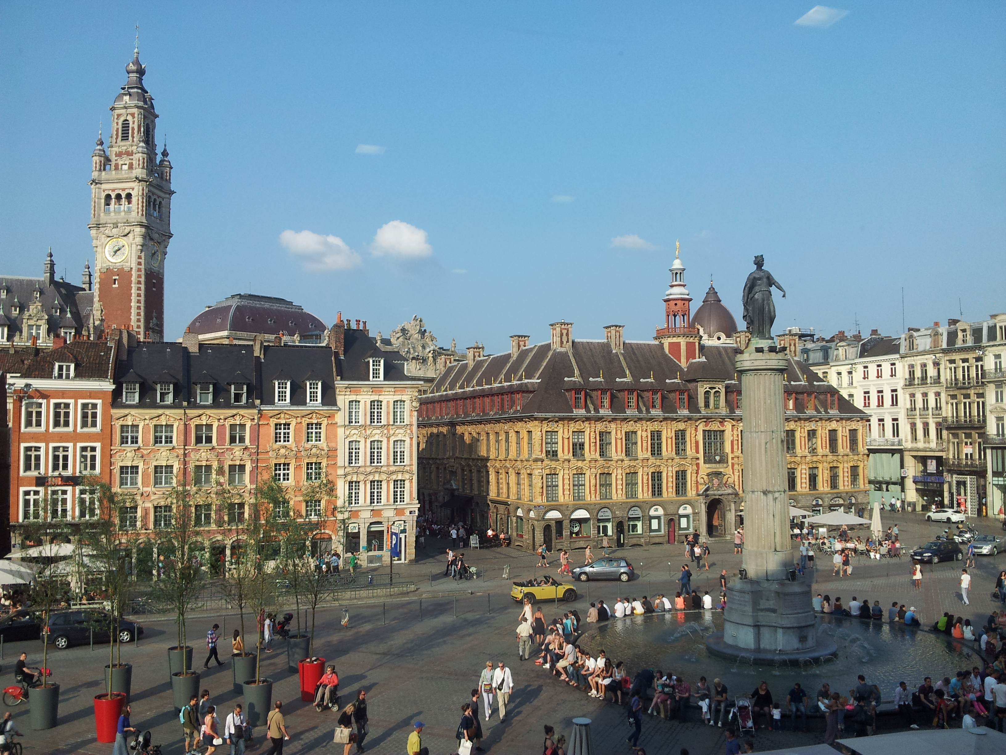 Lille : Place du Général-de-Gaulle, (Colonne de la Déesse, la Vieille Bourse et le Beffroi)